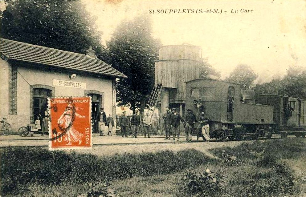 Train en provenance de Meaux et à destination de Dammartin en gare de Saint-Soupplets, pendant les premières années de l'exploitation. Le bâtiment-voyageurs a été doté d'un étage avant la Première Guerre mondiale.